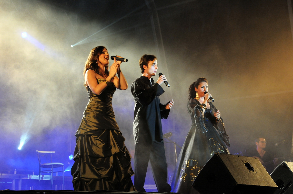 Al-Mouraria, grupo de fado